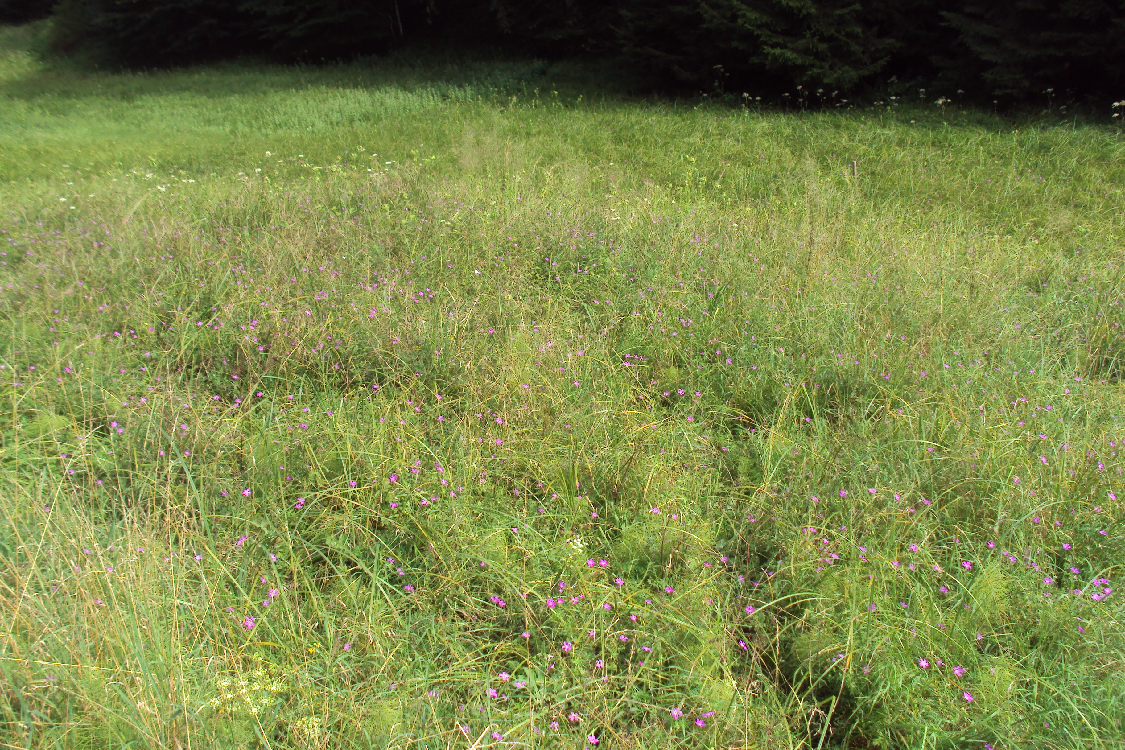 Přírodní památka Černý důl na Kokořínsku